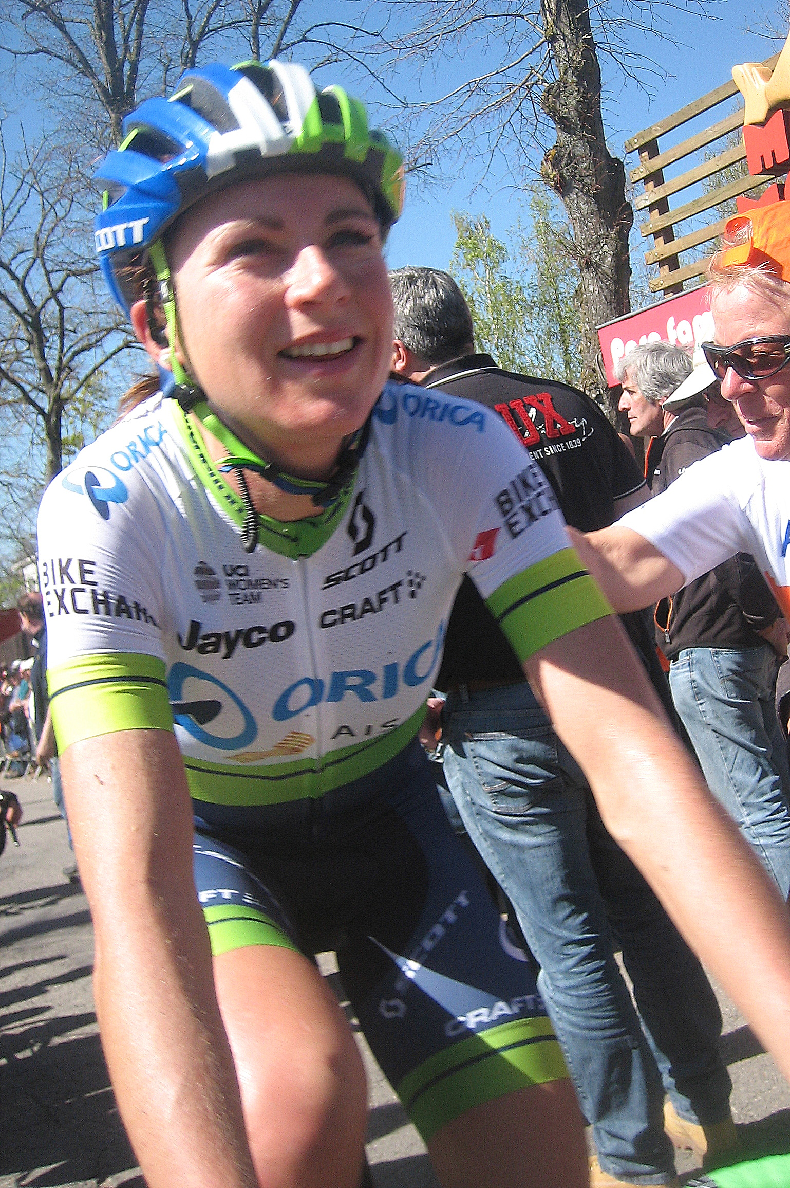 Annemiek van Vleuten (Orica-AIS) na finish Waalse Pijl 2016